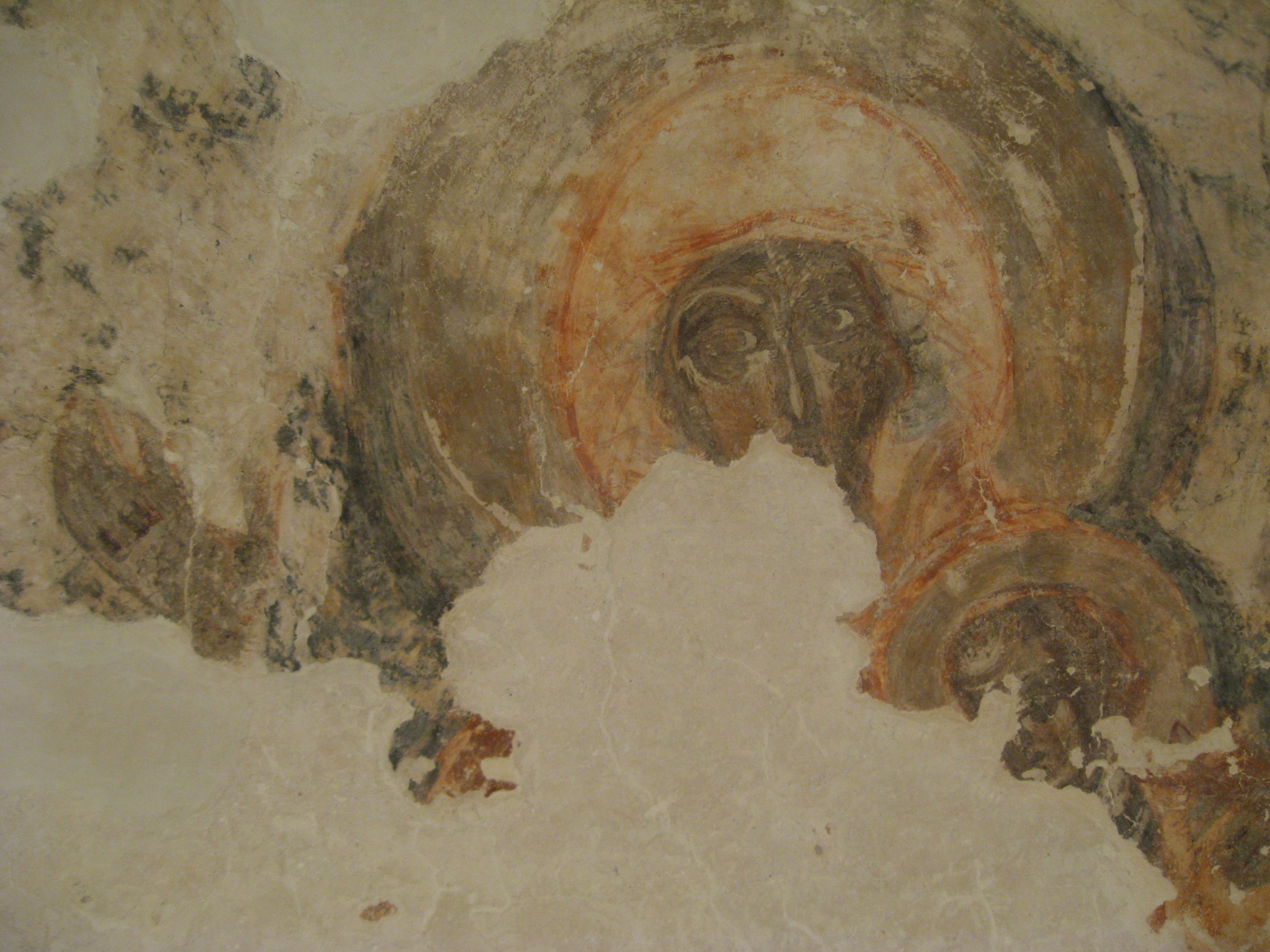 Фреска собора Снетогорского монастыря. 1313 год.